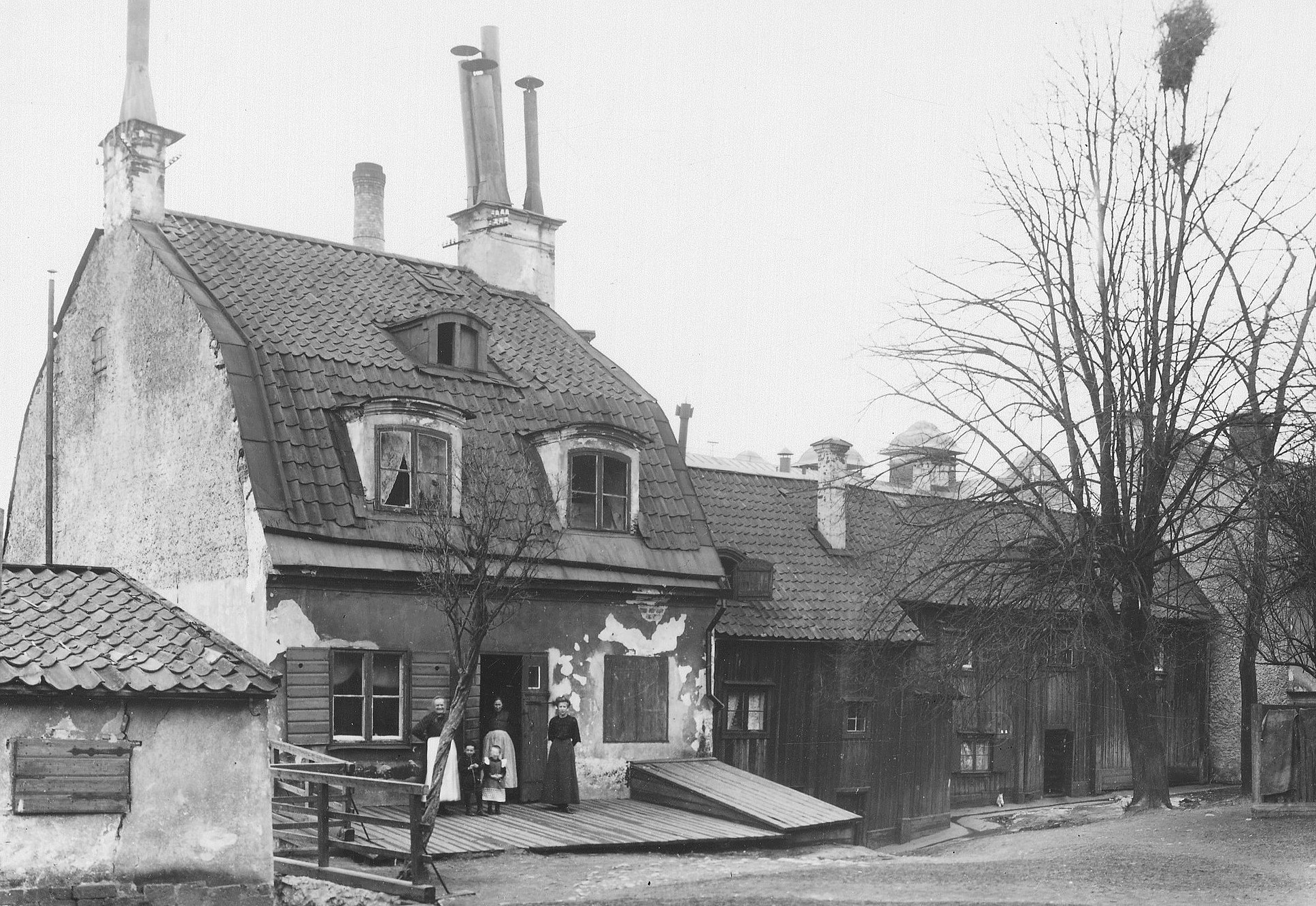 Dagens Malmgårdsvägen 59A, B, gårdssidan